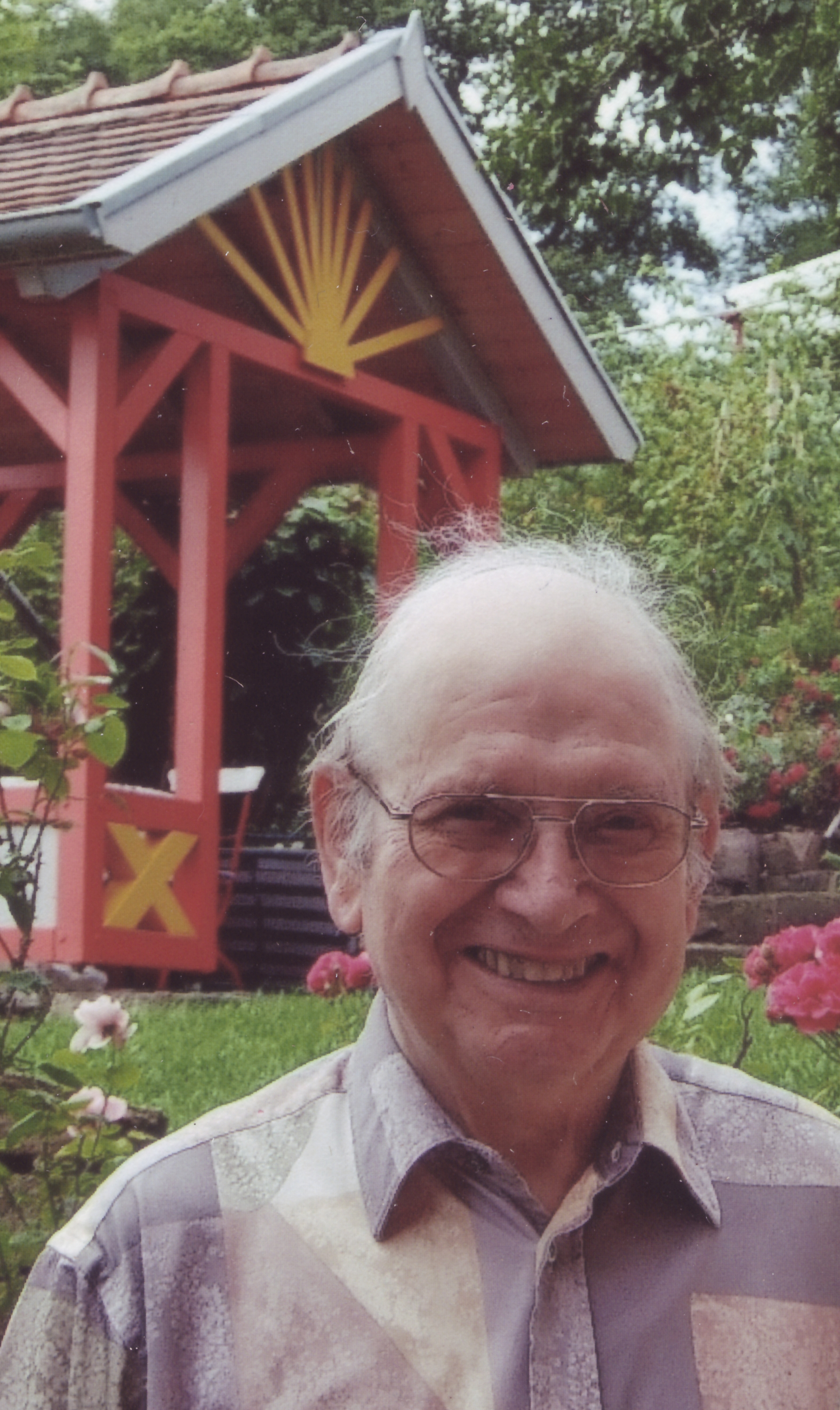 Der Maler, Grafiker und Bühnenbildner Rolf Tschierschky im Alter von 84 Jahren